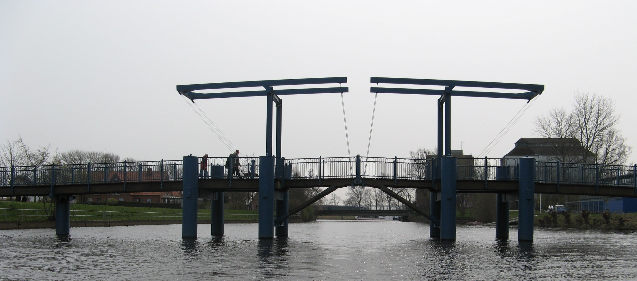 Bridge in Friedrichstadt Author: Dirk Ingo Franke